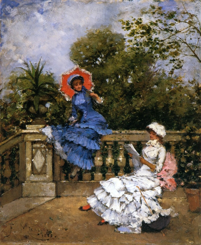 Lecture au jardin, huile sur toile de Francesco Miralles Galup (1848-1901).